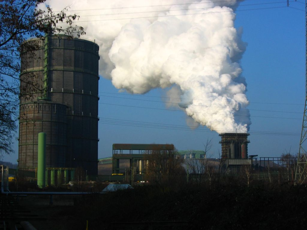 Kokerei Prosper, 2006, Löschschwaden und Gasometer